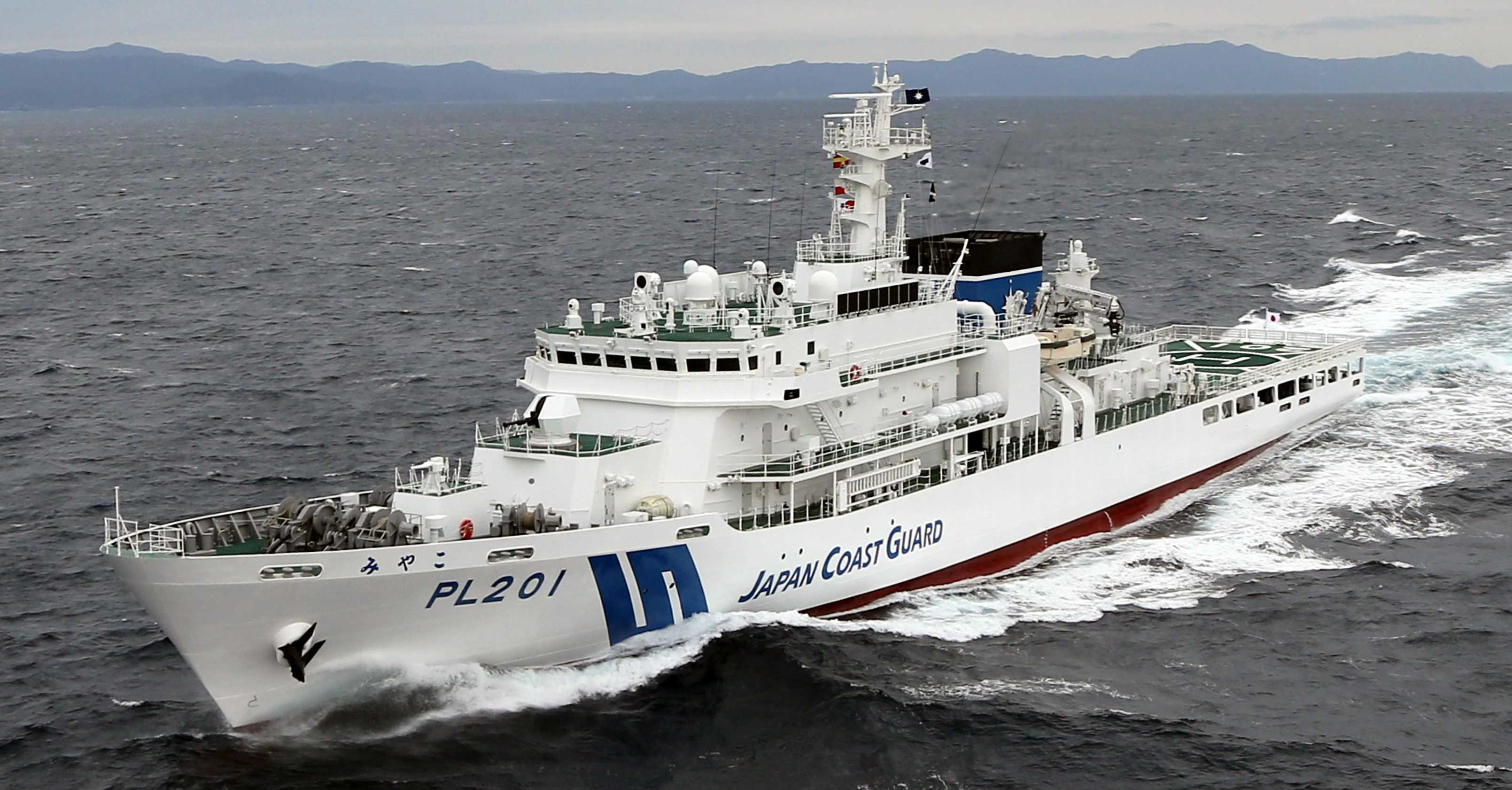 巡視船「みやこ」の就役について 令和 2 年 2 月 20 日、巡視船「みやこ」が就役し、第十一管区海上保安本部 中城海上保安 部 に新たに配備されます。 同船は、平成 28 年 12 月の関係閣僚会議にて決定された「海上保安体制強化に関する方針」 を受け、尖閣領海警備体制の強化や大規模事案の同時発生に対応するため建造されました。 今後は、尖閣諸島をはじめとする沖縄周辺海域において、領海警備、海難救助、治安の確 保、海洋権益保全及び海洋環境保全といった多様な業務にあたってまいります。